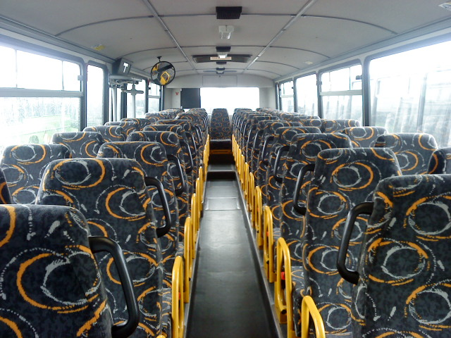 Intérieur d'un Renault-Karosa Récréo C-935